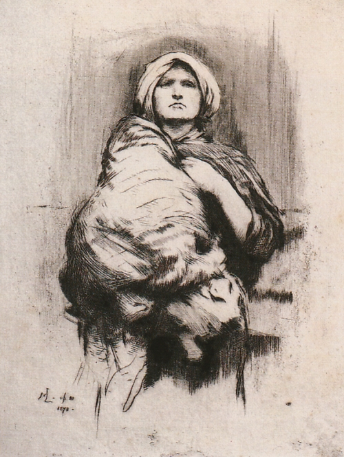 A Vagrant